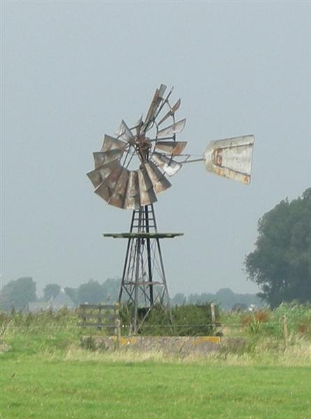 Windmotor bij Jorwerd (Jorwert)